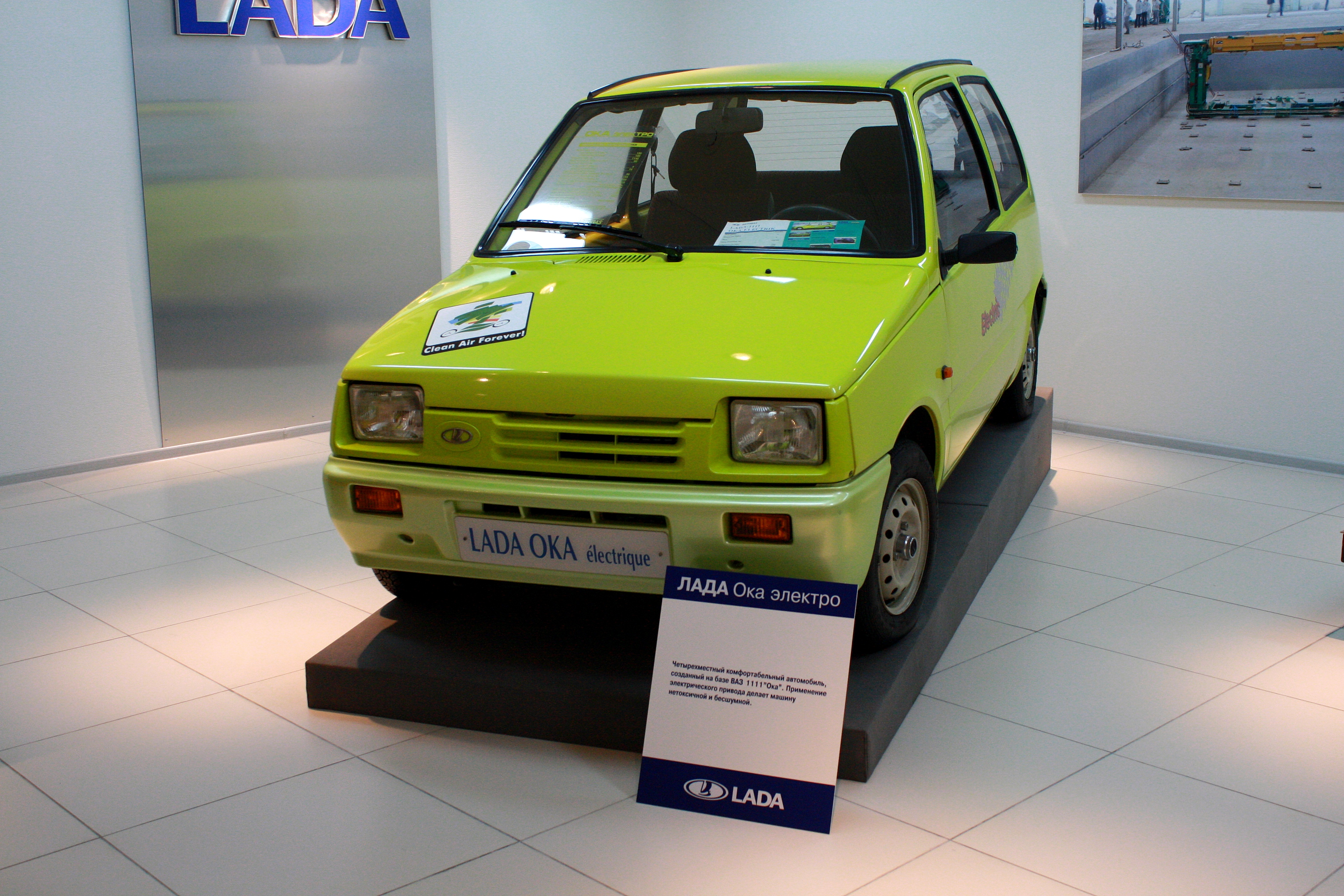 Четырехместный комфортабельный автомобиль, созданный на базе ВАЗ 1111 "Ока". Применение электрического привода делает машину нетоксичной и бесшумной.